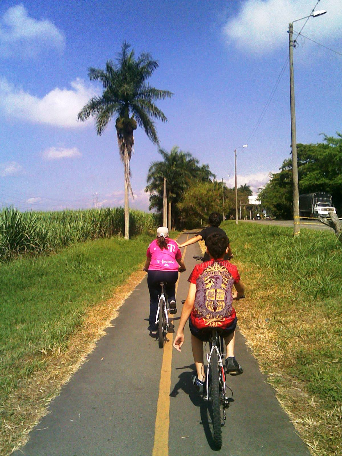 ciclovia Palmira - Cali ( Valle del Cauca)